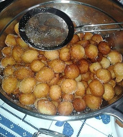 Dolci a forma sferica tipici di Piana degli Albanesi e originari d'Albania.